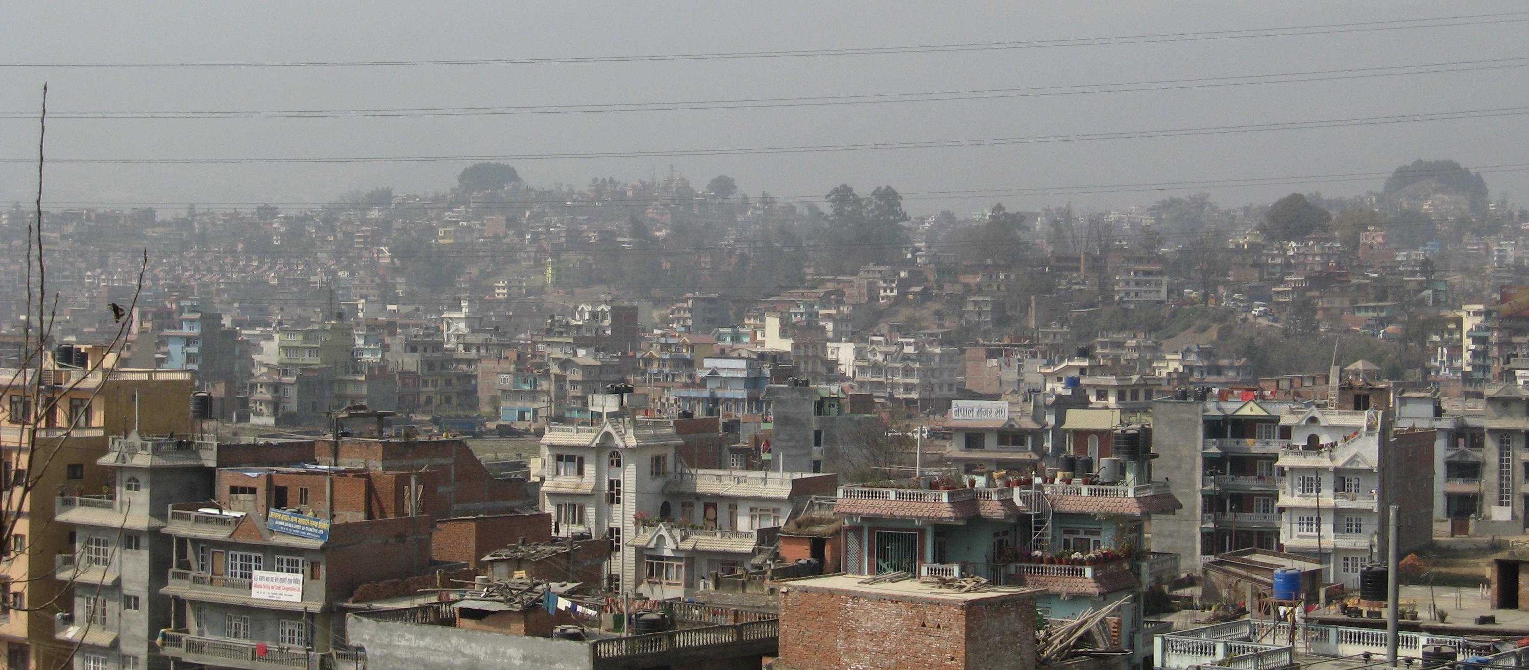 Kathmandu